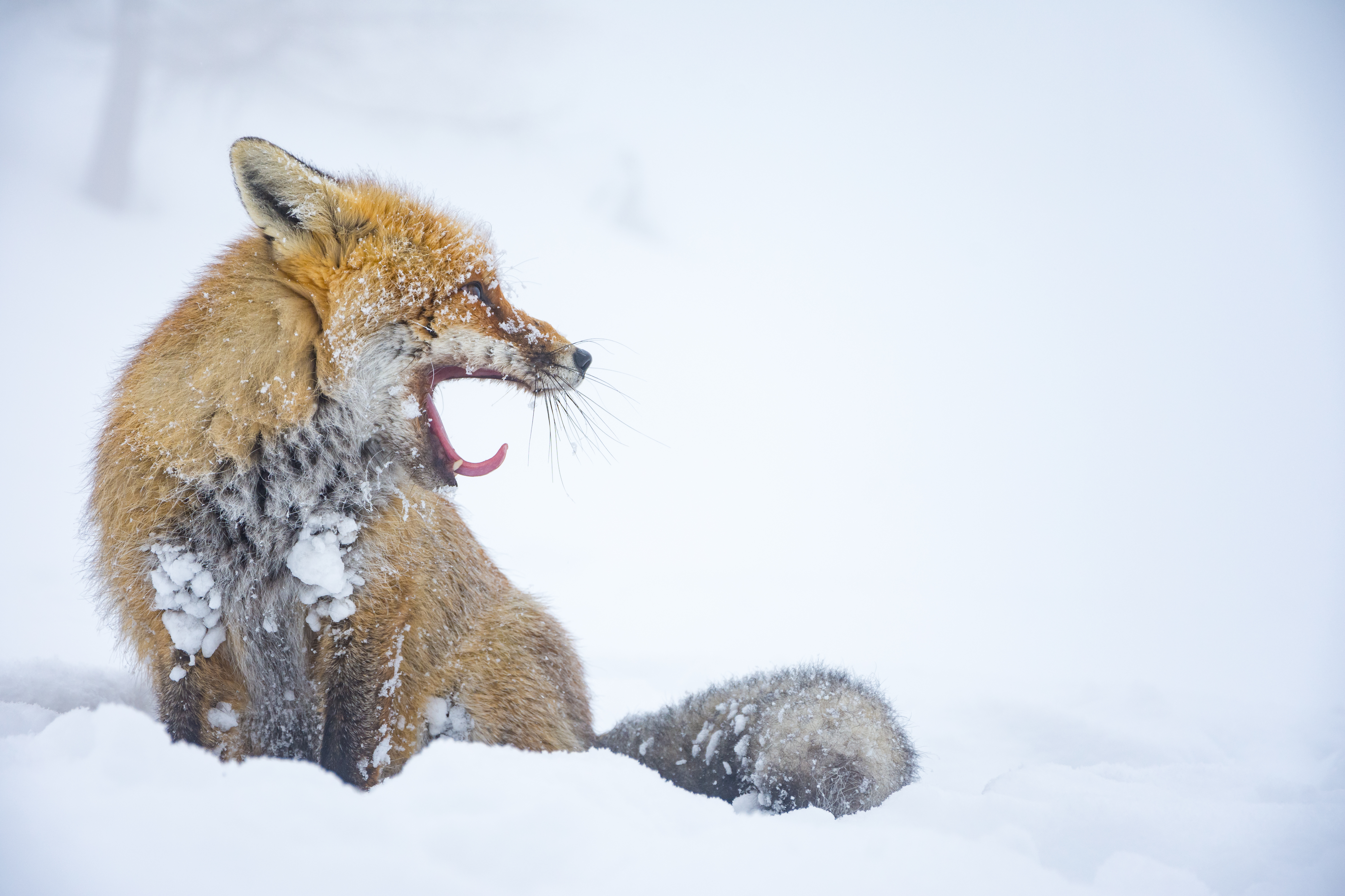 Parco nazionale del Gran Paradiso (Q847690)